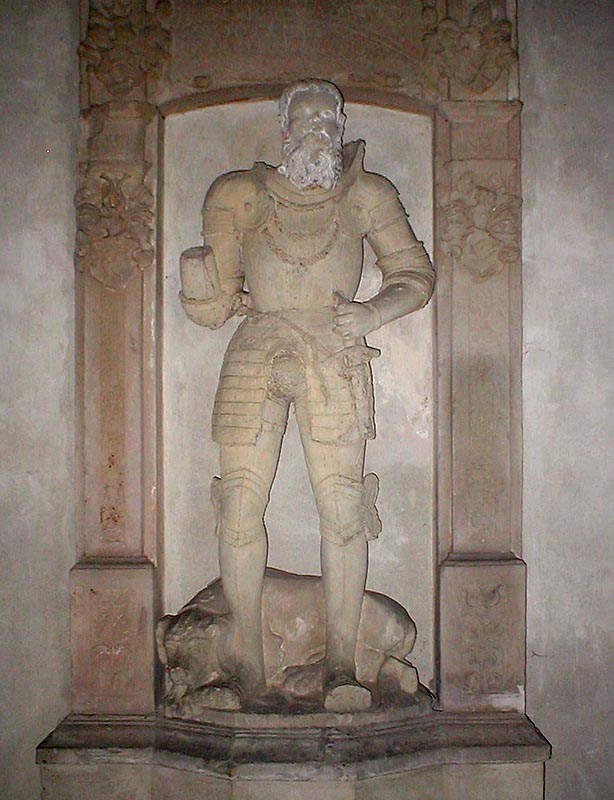 Hirschhorn-Epitaph in der Klosterkirche von Hirschhorn (Neckar)